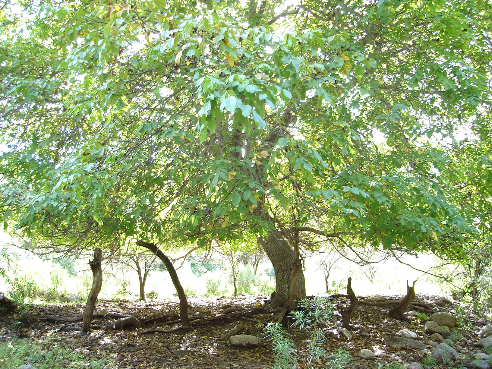 Árboles de nogales en la zona de La gredita.